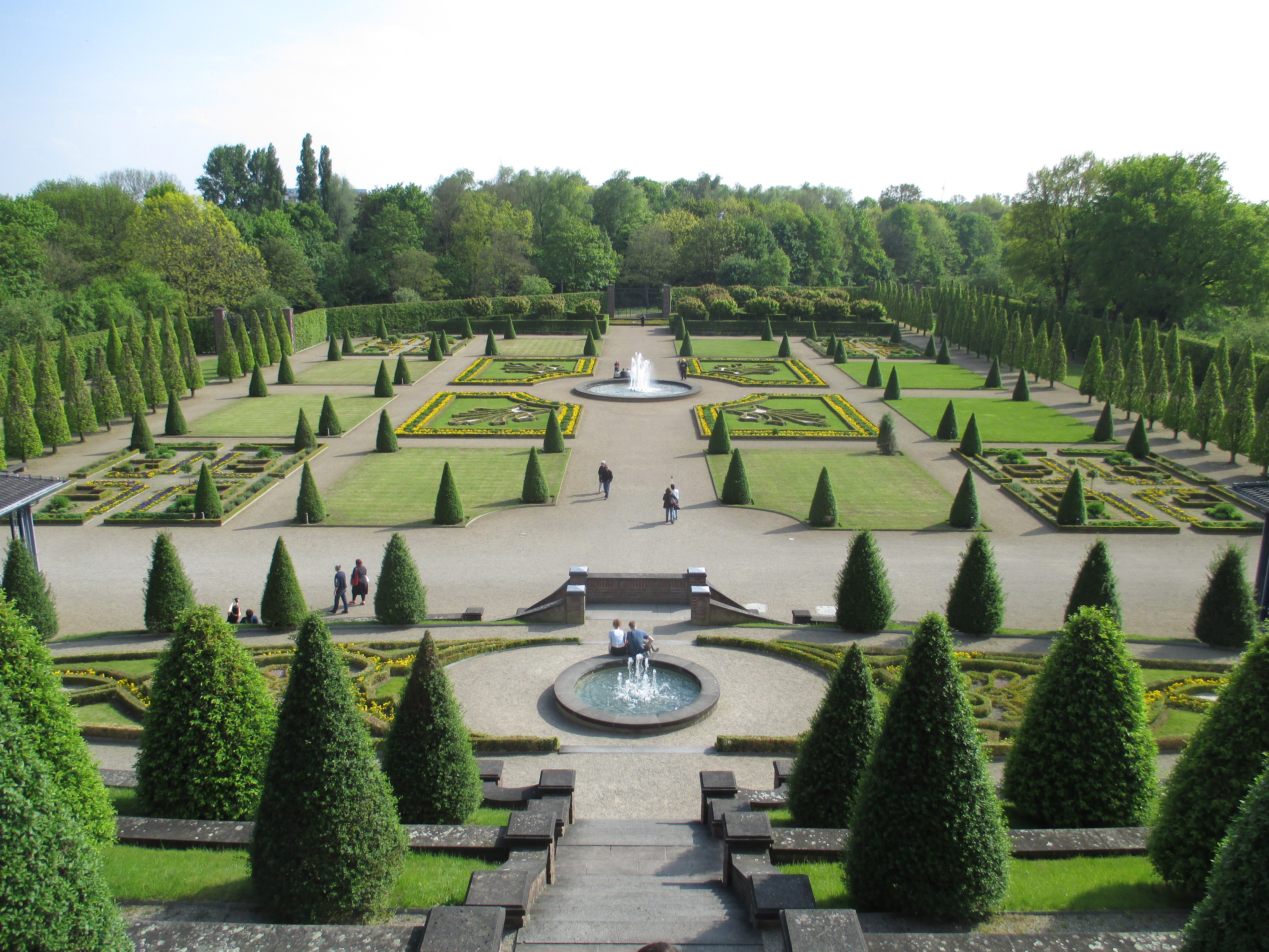 Terrassengarten: Station 4 des WandelWeg in Kamp-Lintfort.